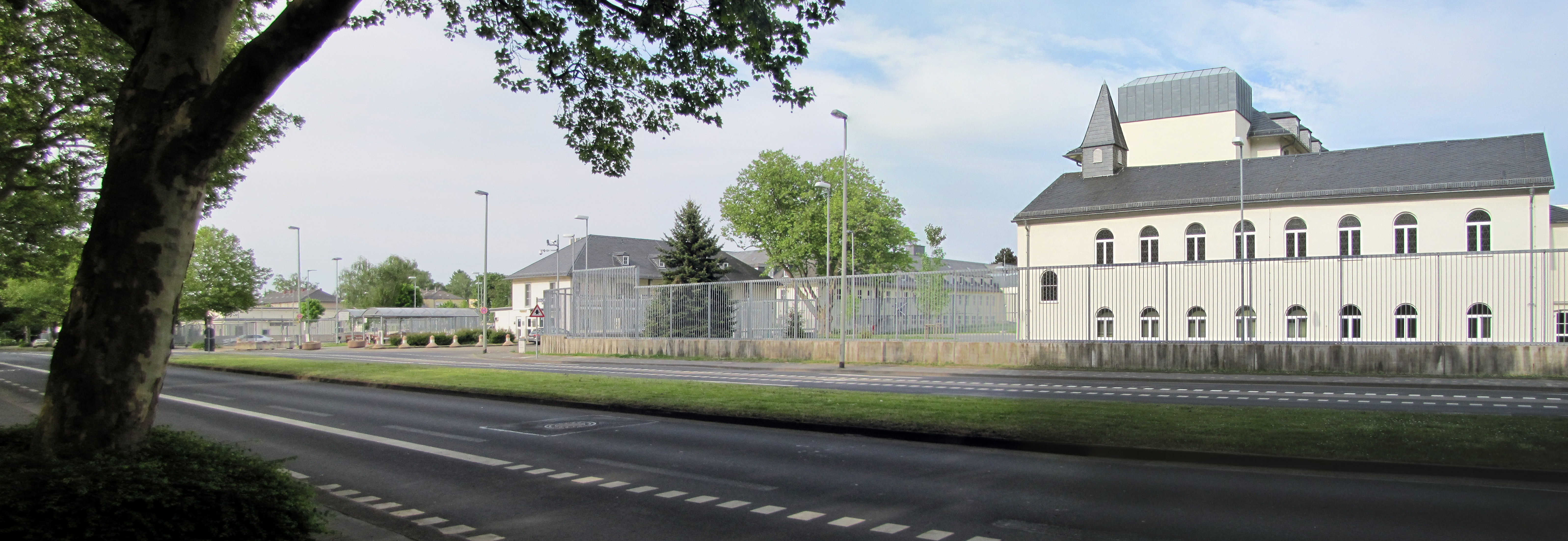 US-Generalkonsulat in Frankfurt am Main. 2015, Ansicht von der Giessener Strasse. Zugang zum Visa-Schalter.